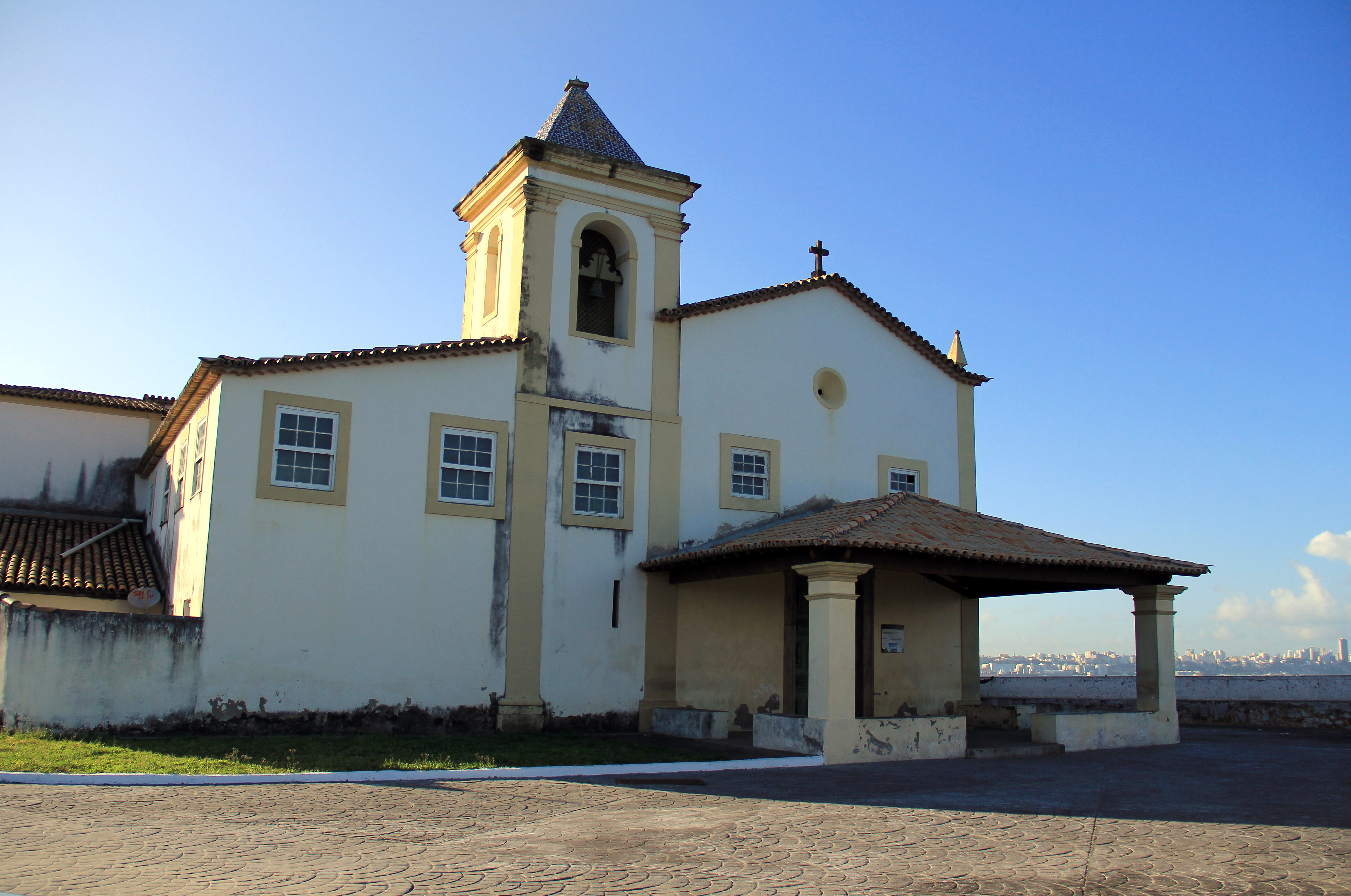 Igreja e Mosteiro de Nossa Senhora do Monte Serrat